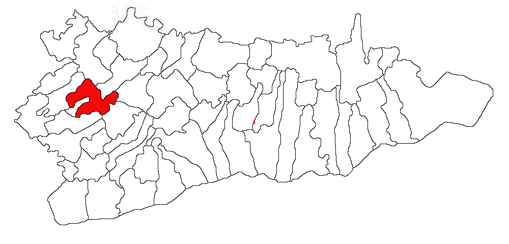 Categorie:Hărţi ale judeţului Călăraşi